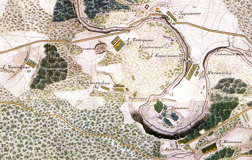 Участок. Топографическая карта окружности Москвы, снятая офицерами Квантирмейстерской части 1818 года. Гравирована и печатана в военно-топографическом бюро при главном штабе его импереторского Величества 1823 года.